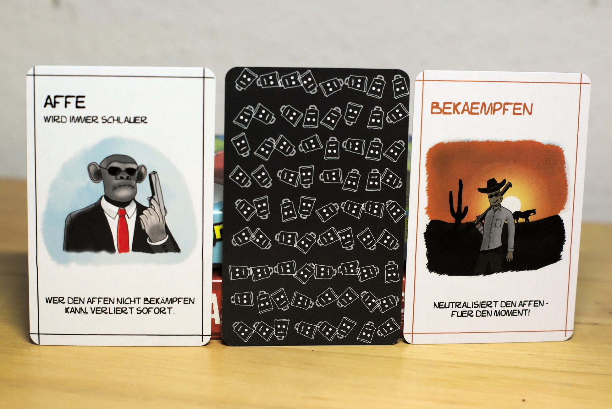 BIZARRO WELT Kartenspiel "ACHTUNG ACHTUNG"